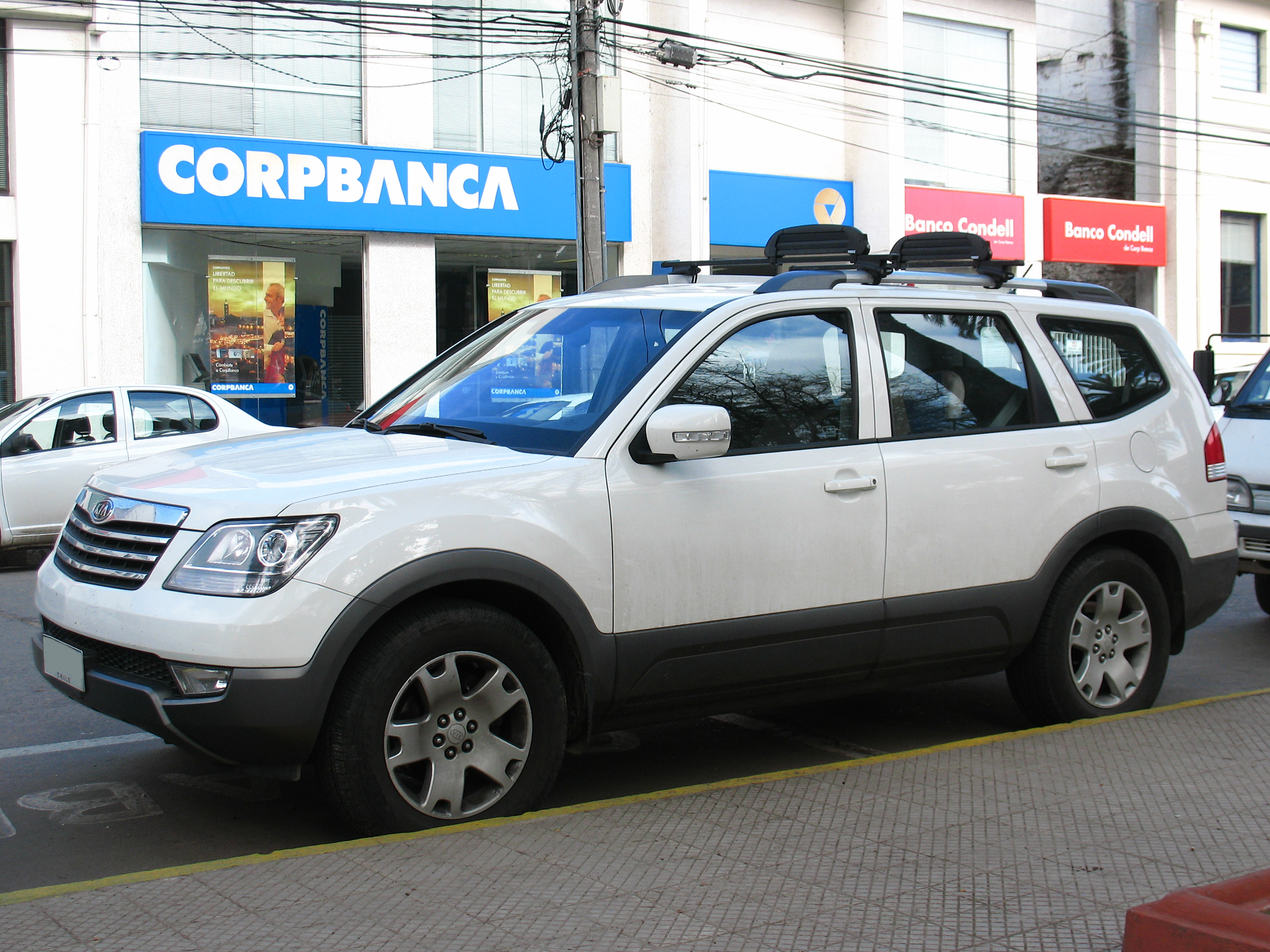 Kia Mohave EX 3.8 2010